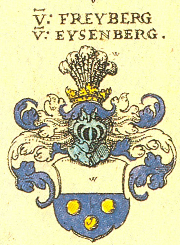 Ritterschaft und Adel in Schwaben von Freyberg von Eysenberg